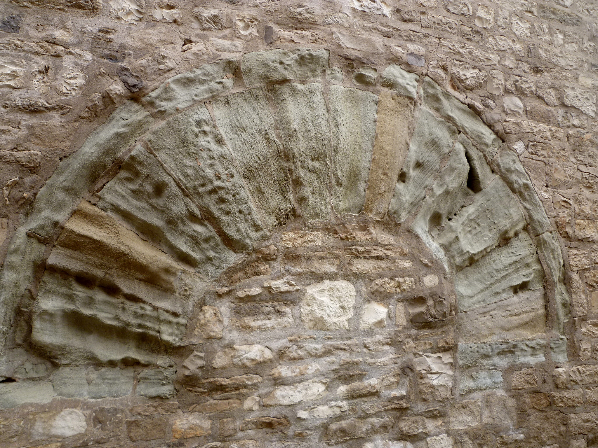 Església parroquial de Sant Jaume de Ferran (Estaràs): antiga portalada